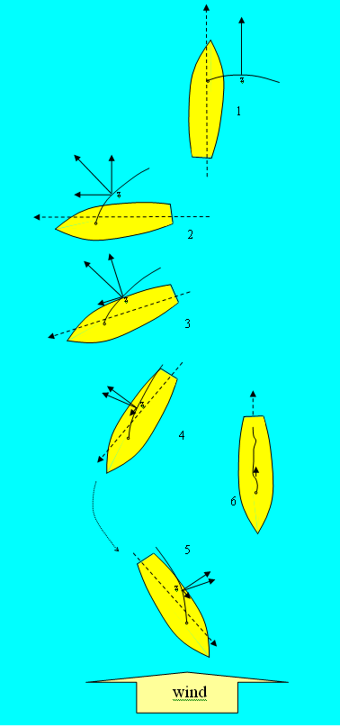 Effect van wind en zeil bij diverse koersen